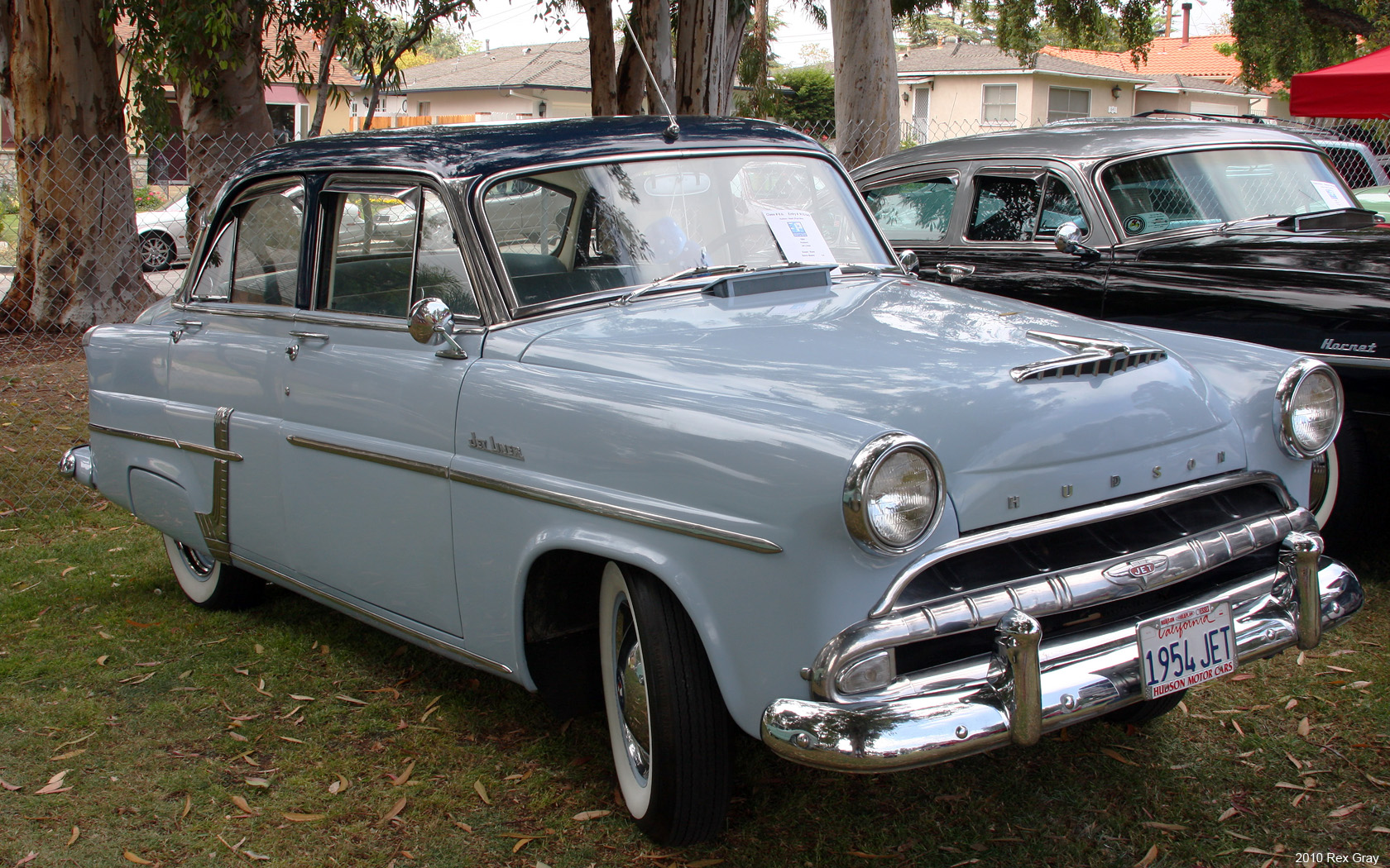 1954 Hudson Jet Liner 4d sdn